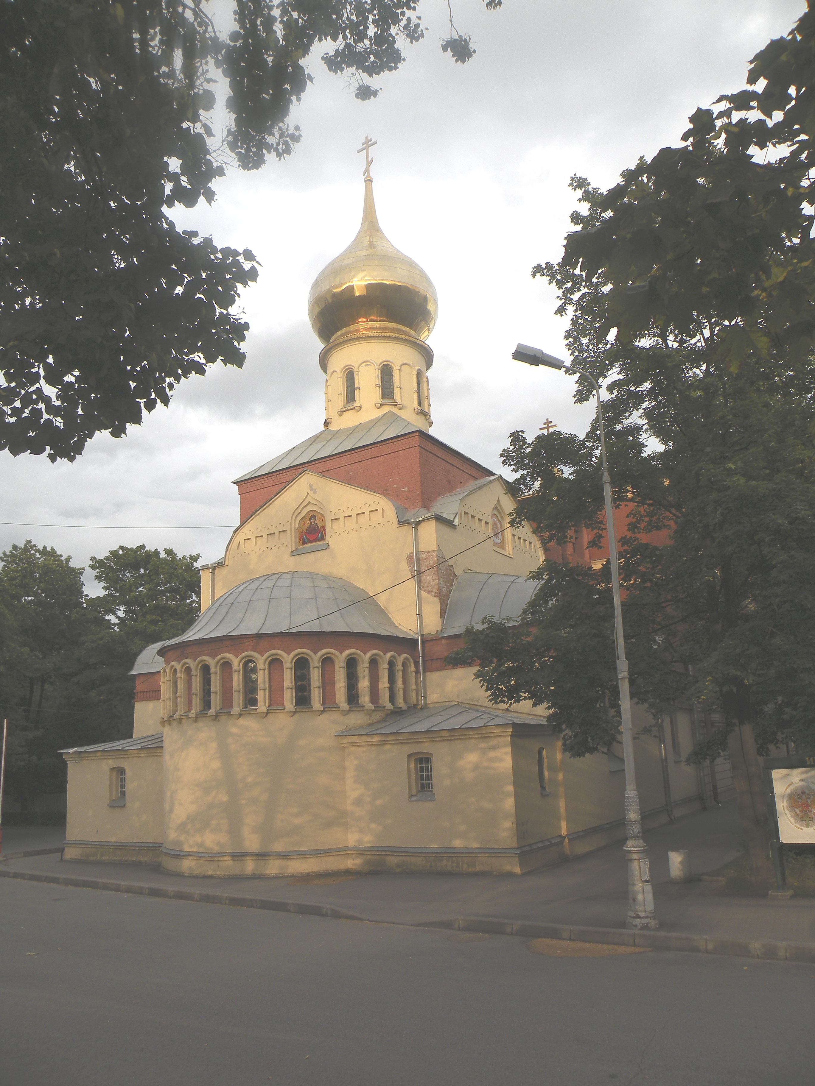 Церковь Покрова Св.Богородицы при Политехническом Институте Петра Великого